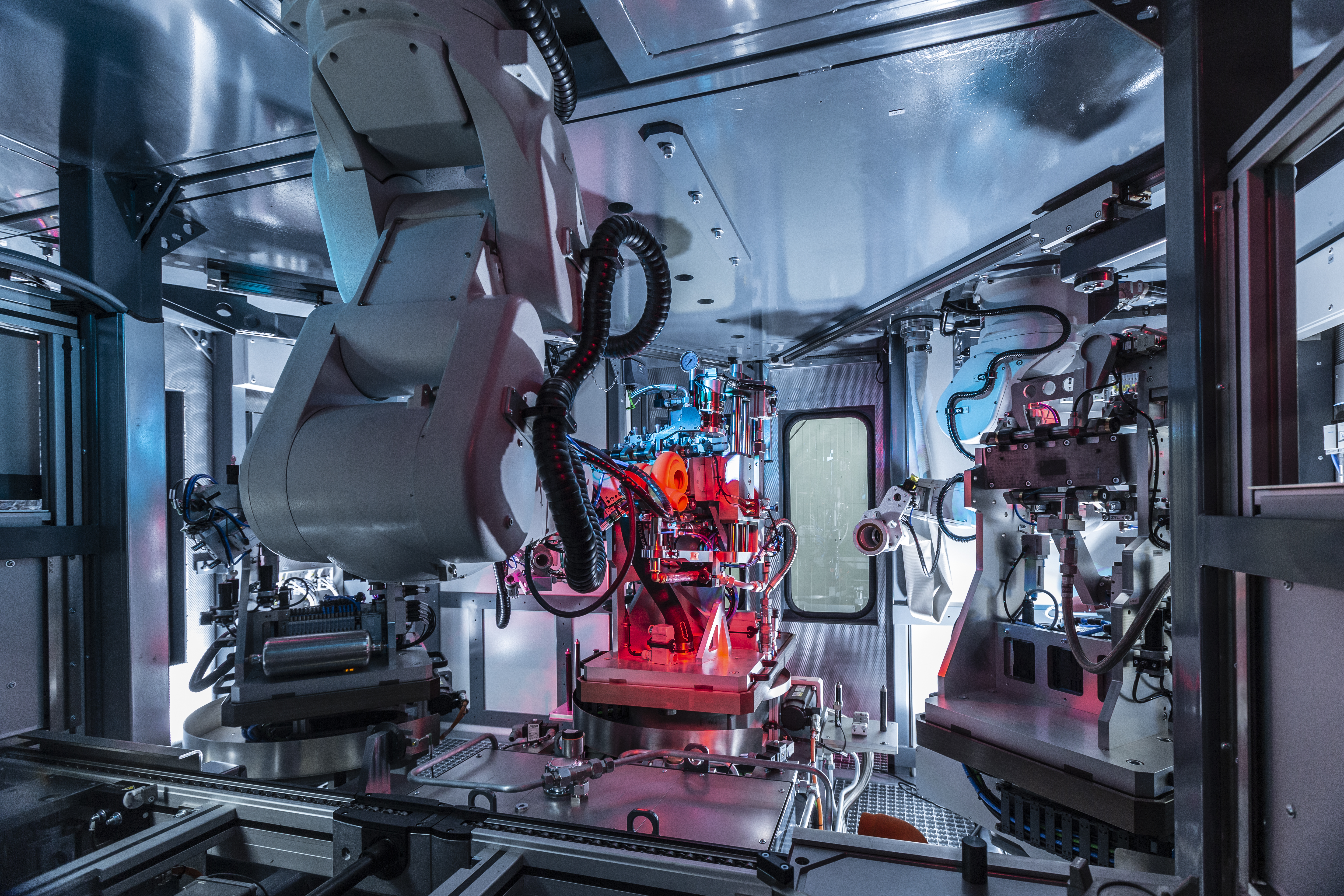 Innenansicht einer Prüfzelle für Turbolader von HAHN Automation